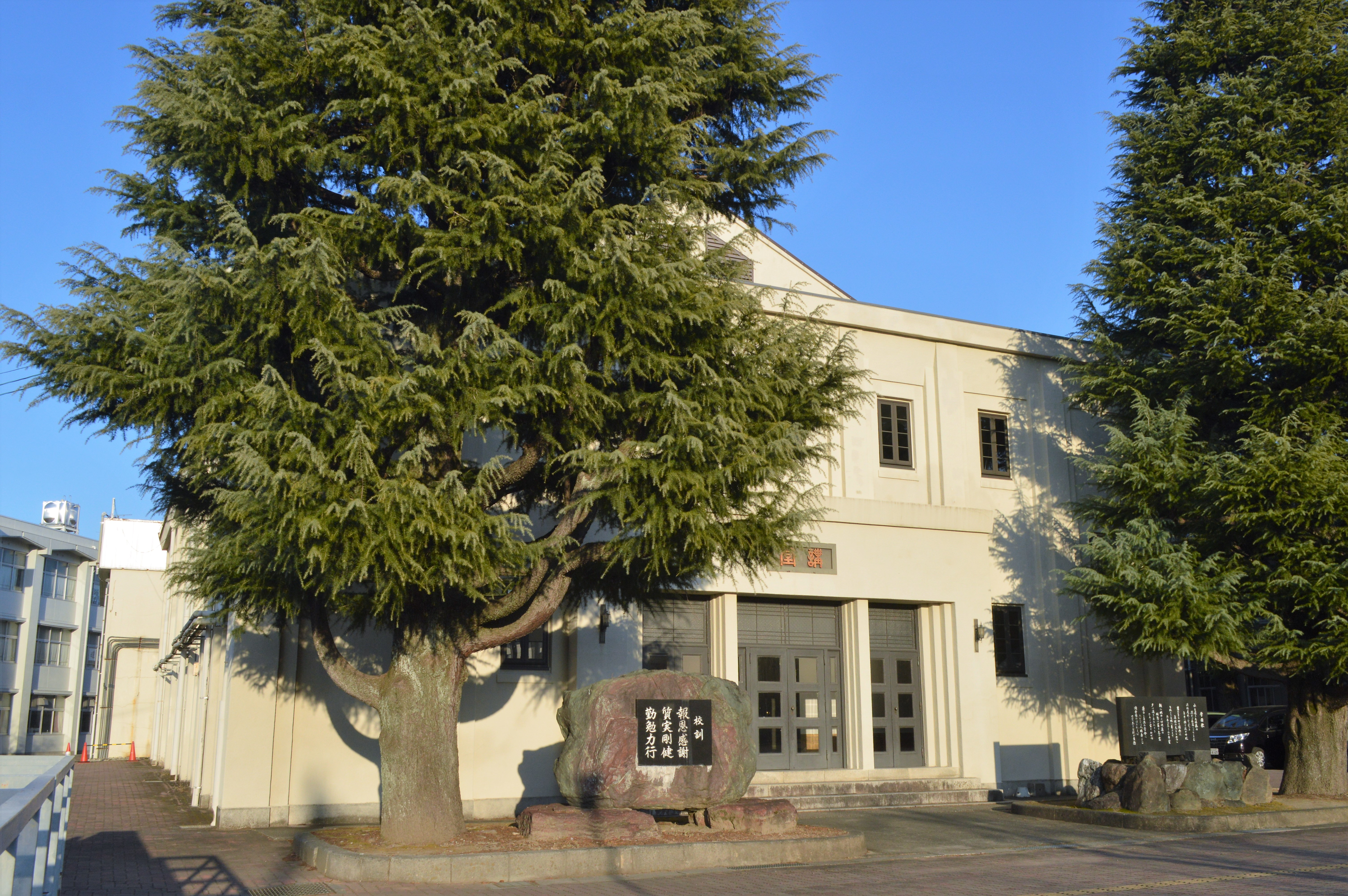 愛知県江南市にある滝学園講堂。登録有形文化財。